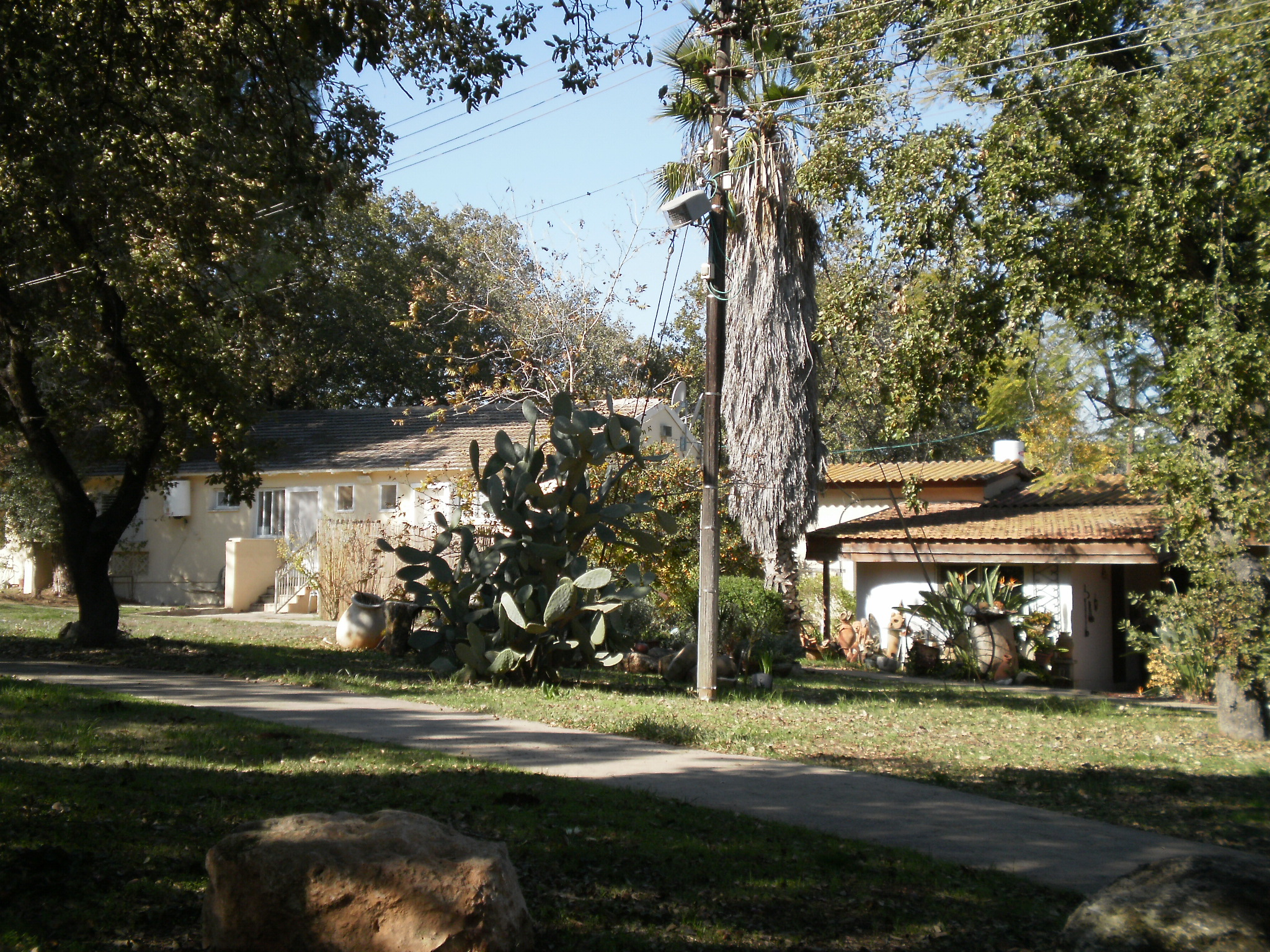 kibbutz Hasolelim, Israel קיבוץ הסוללים, ישראל